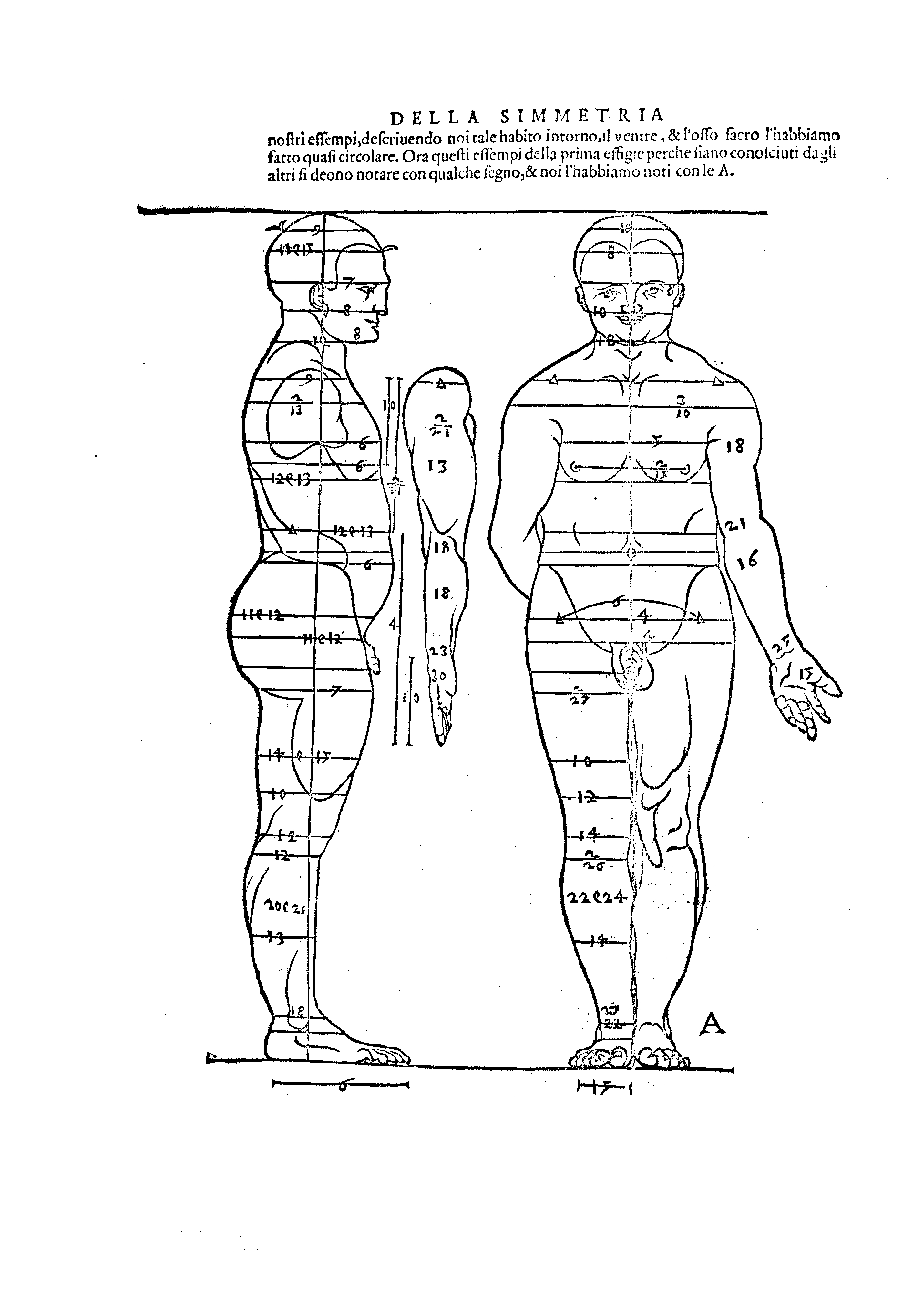 Di Alberto Durero ... Della simmetria dei corpi humani, libri quattro. Nouamente tradotti dalla lingua latina nella italiana, da m. Gio. Paolo Gallucci salodiano ... Et accresciuti del quinto libro, nel quale si tratta, con quai modi possano i pittori, & scoltori mostrare la diuersita della natura de gli huomini, & donne, & con quali le passioni, che sentono per li diuersi accidenti, che li occorrono. Hora di nuouo stampati .... - In Venetia : appresso Roberto Meietti, 1594 (In Venetia : appresso Domenico Nicolini, 1591). - [6], 143 [i.e. 141, 1] c. : ill. ; fol. . Illustrazione: 3v